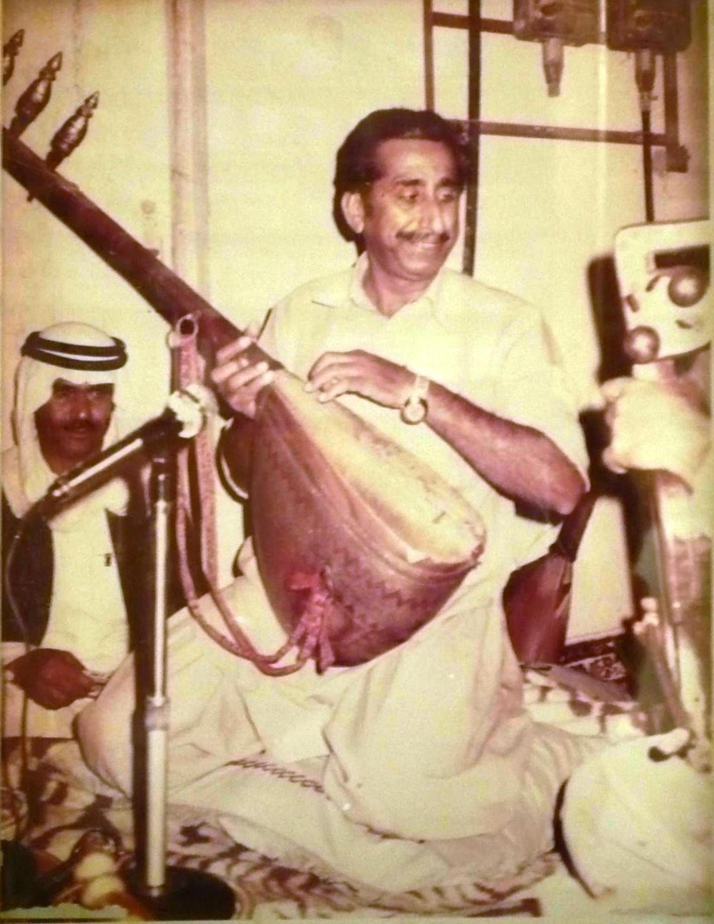 عکس ملا کمال خان هوت در حال اجرا در کشور قطر مربوط به دهه ی 80 میلادی